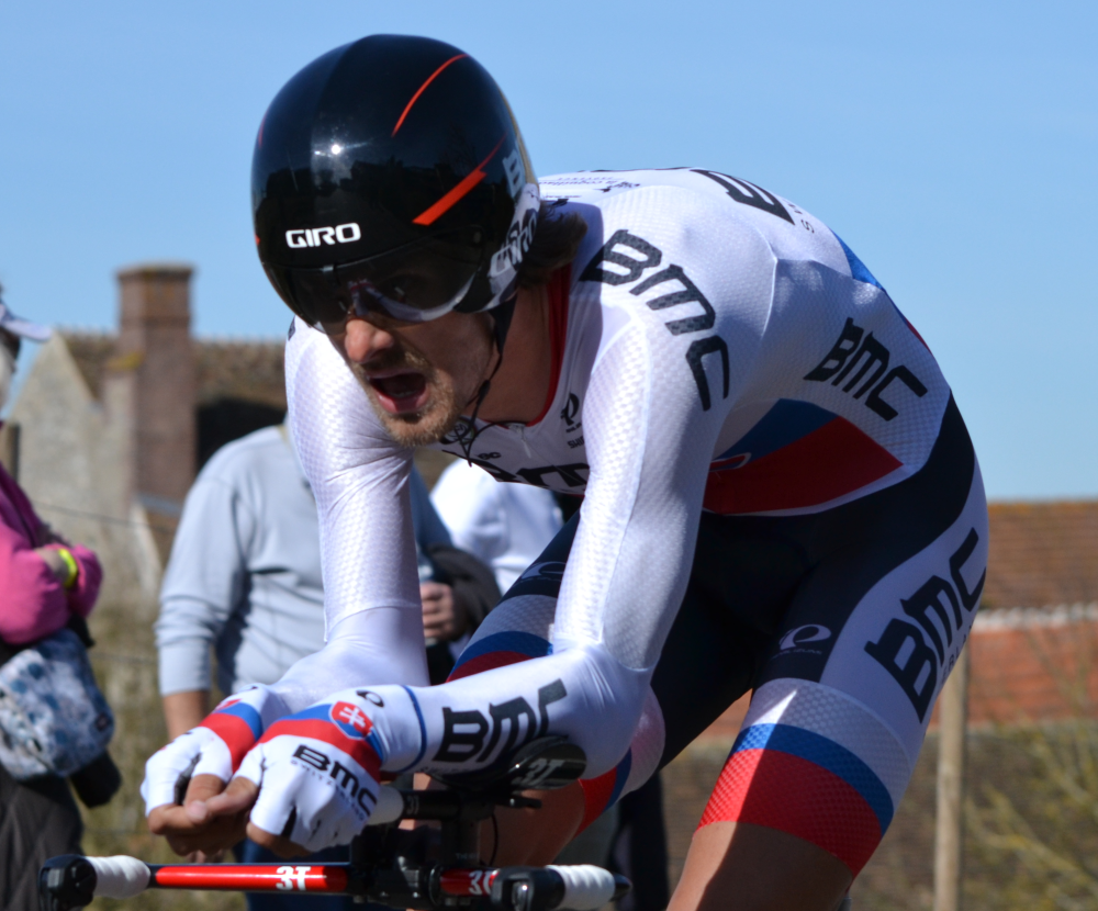 Paris-Nice 2015